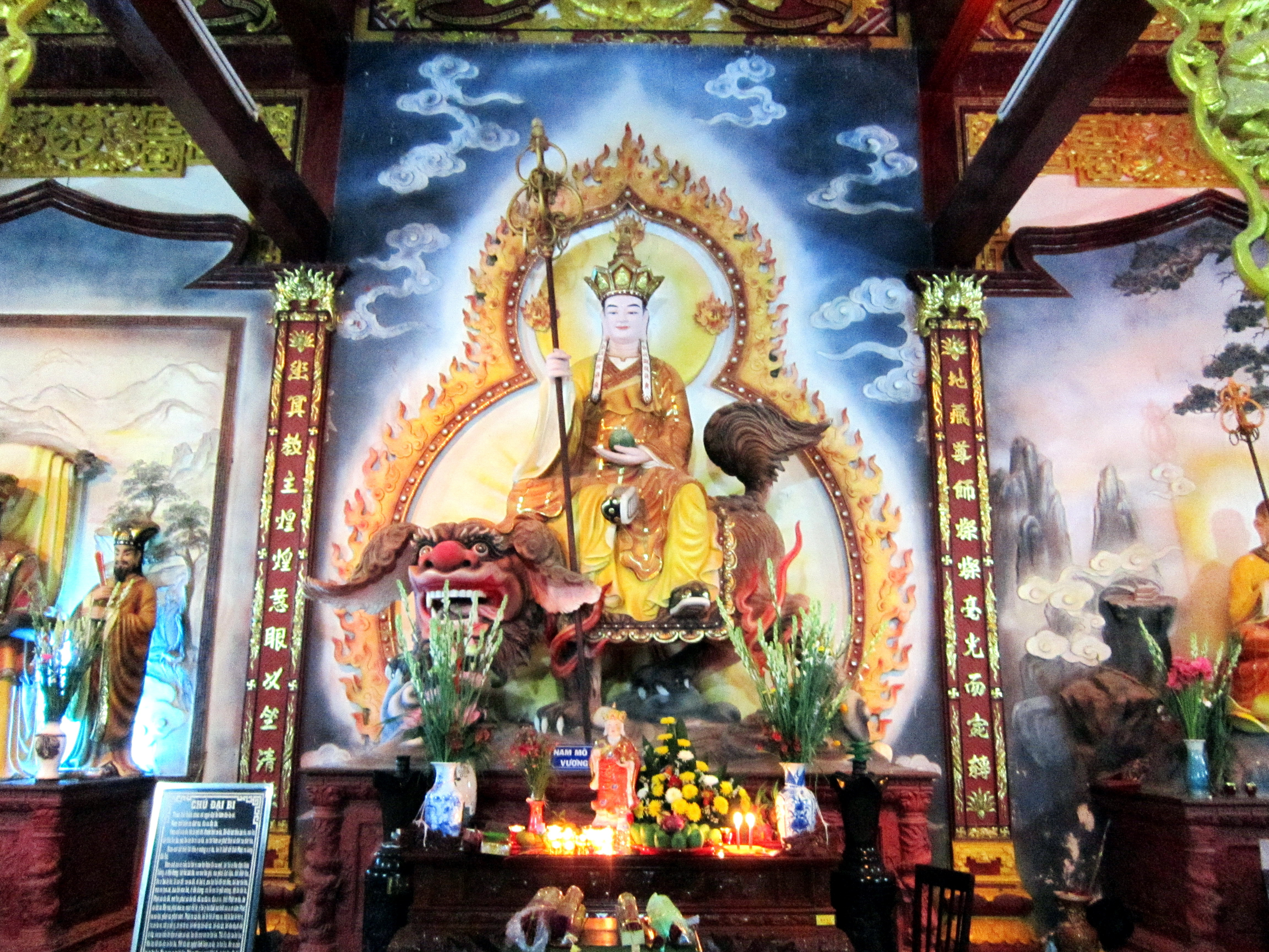 Tượng Địa Tạng Bồ Tát trong chùa Quan Âm Phật Đài ở phường Nhà Mát, thành phố Bạc Liêu, tỉnh Bạc Liêu (Việt Nam).